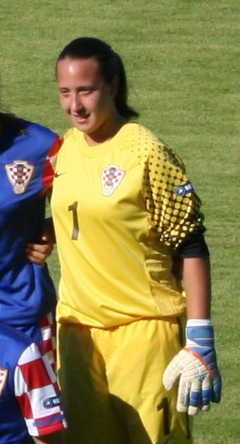 Nicole Vuk